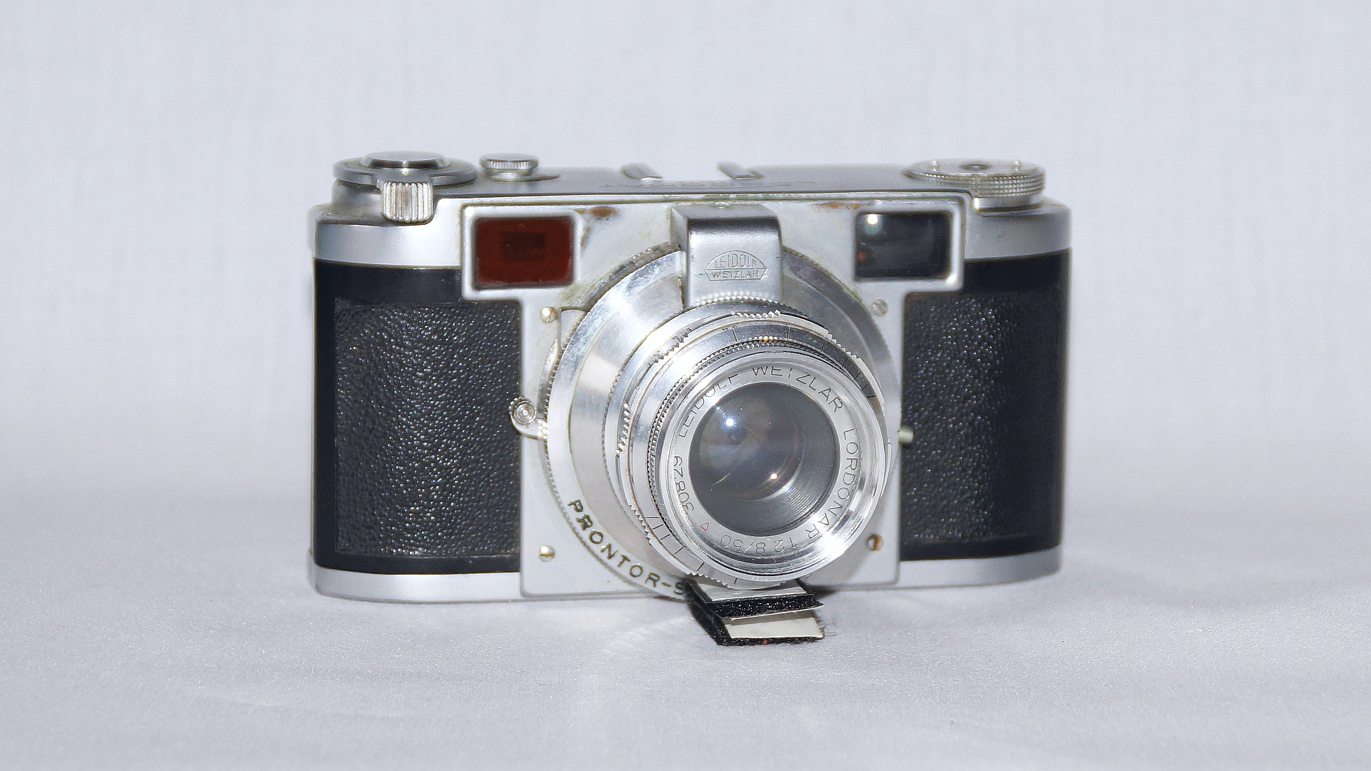 Lordomat mit Lordonar 50mm, 1:2.8, von Leidolf Wetzlar - Foto 2019 Wolfgang Pehlemann DSC04850